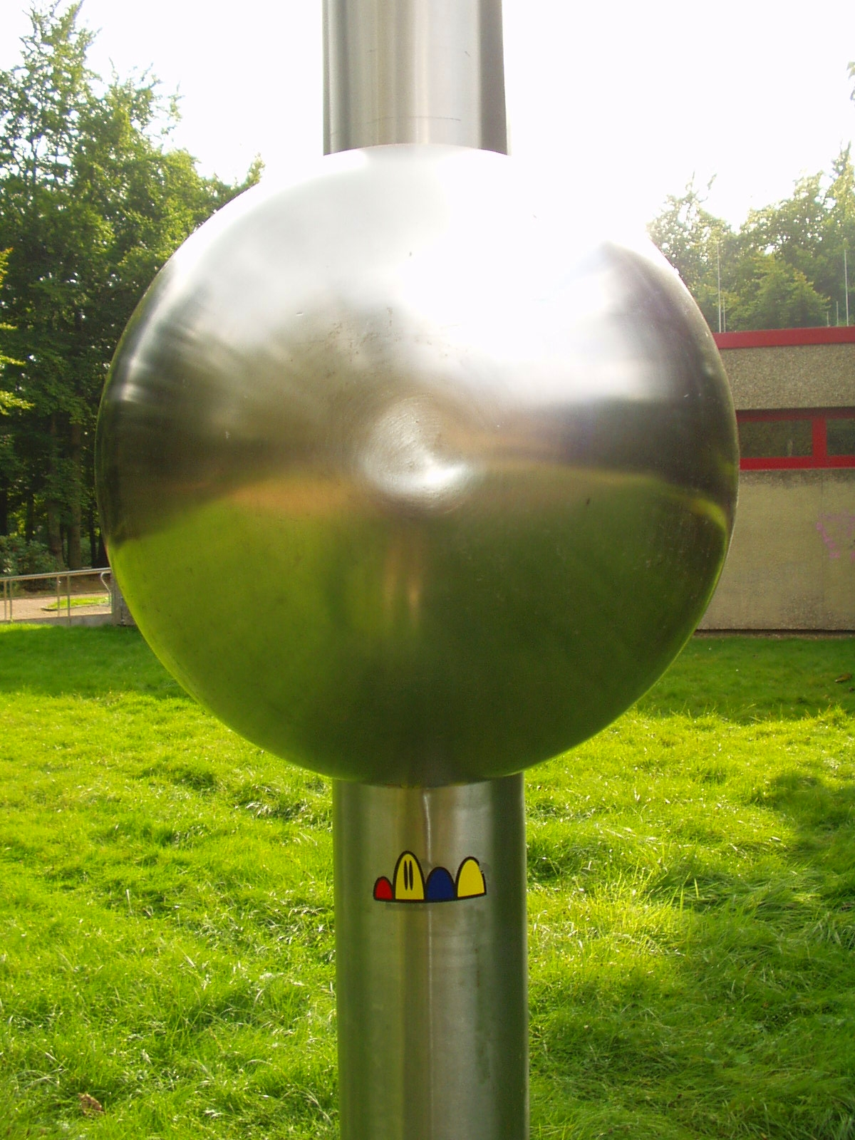 Detail sculpture Säule mit Kugel by Ernst Hermanns Phil II, Uni Gießen/Germany. Weiss jemand, was es mit diesem bunten Aufkleber auf sich hat? Siehe auch hier und da.